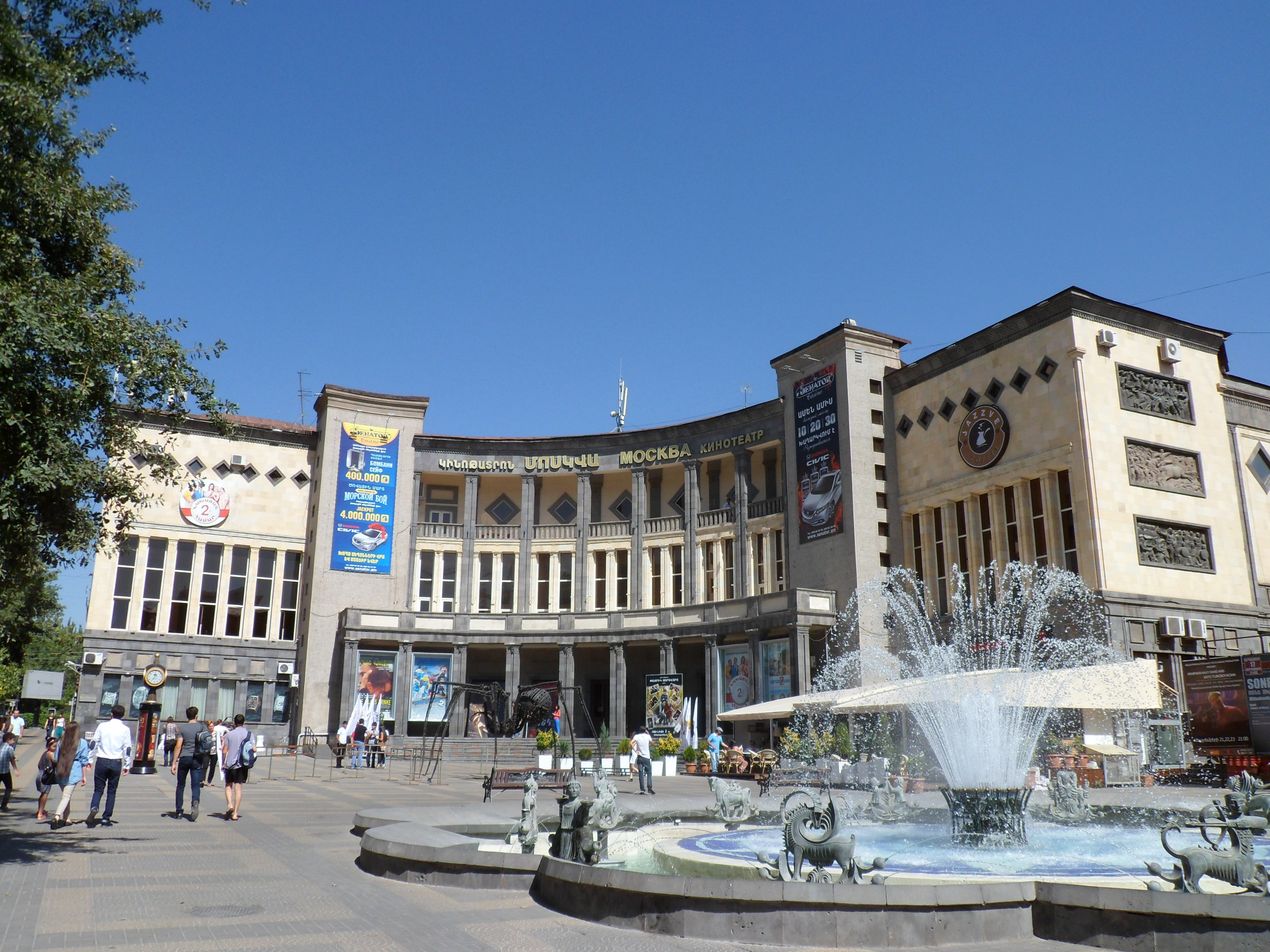 Կինոթատրոն «Մոսկվա» 6/178.3.1